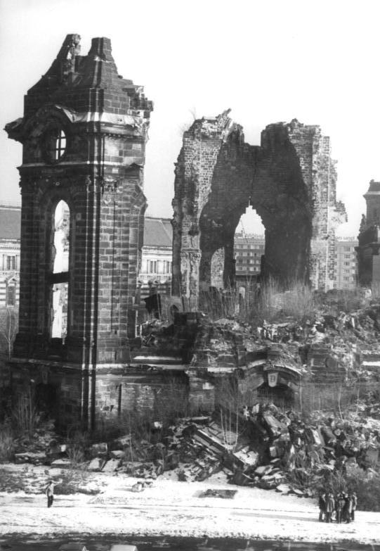 ADN-ZB-Hiekel-6.2.85-zin-Dresden: 40 Jahre nach dem Inferno- Das wohl bedeutendste Wahrzeichen der alten Dresdener Stadtsilhouette war die von George Bähr errichtete Frauenkirche (1726-43). Durch das 95 m hohe Bauwerk schwang sich der protestantische Kirchenbau zu einer bis dahin nicht erreichten monumentalen Großartigkeit und Originalität auf. Das in der Nacht zum 14. Februar 1945 durch anglo-amerikanische Bomber zerstörte Gebäude blieb bis heute als Mahnmal erhalten. -Siehe auch Motiv 1985-0206-25 N und sechsteilige ADN-Meldung vom 6.2.1985